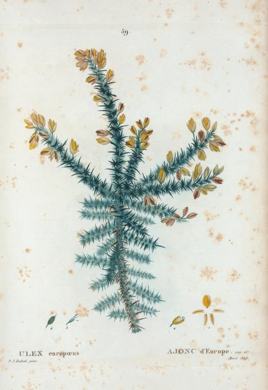 Ulex europaeus = Ajonc d'Europe.